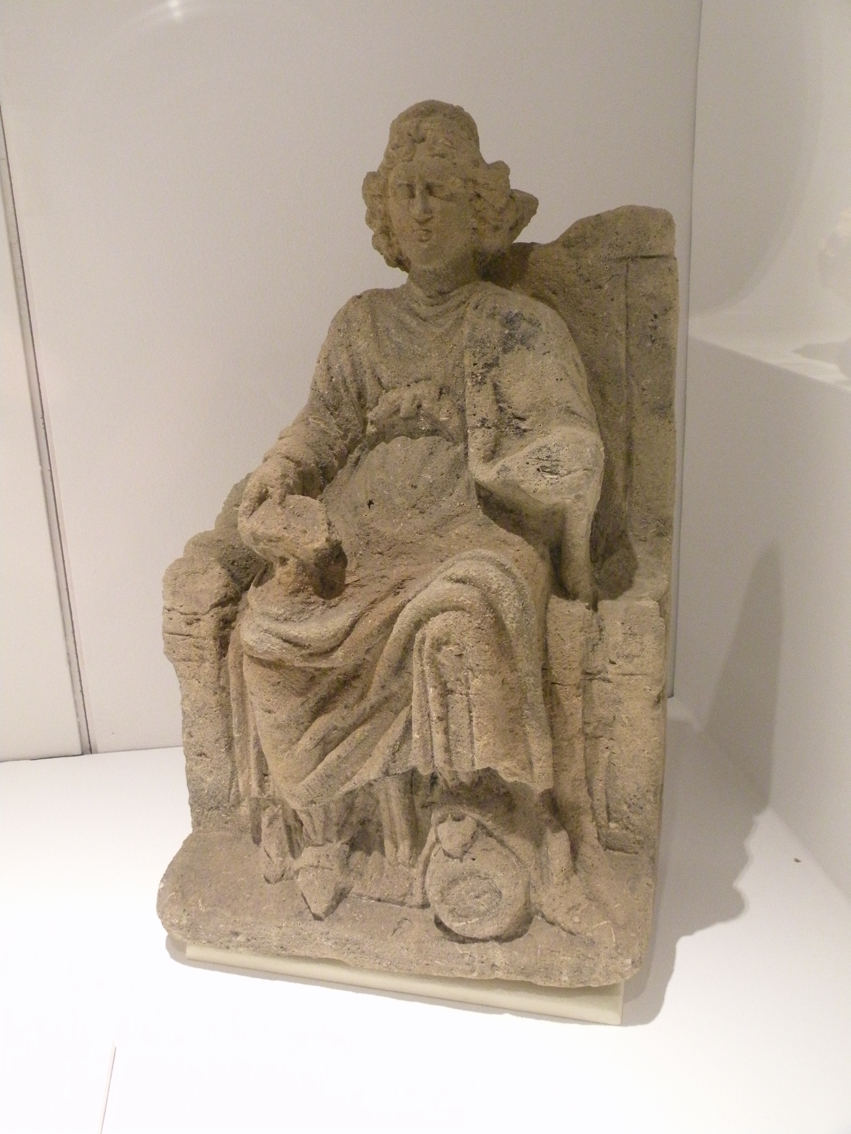 collection du musée du Forum antique de Bavay